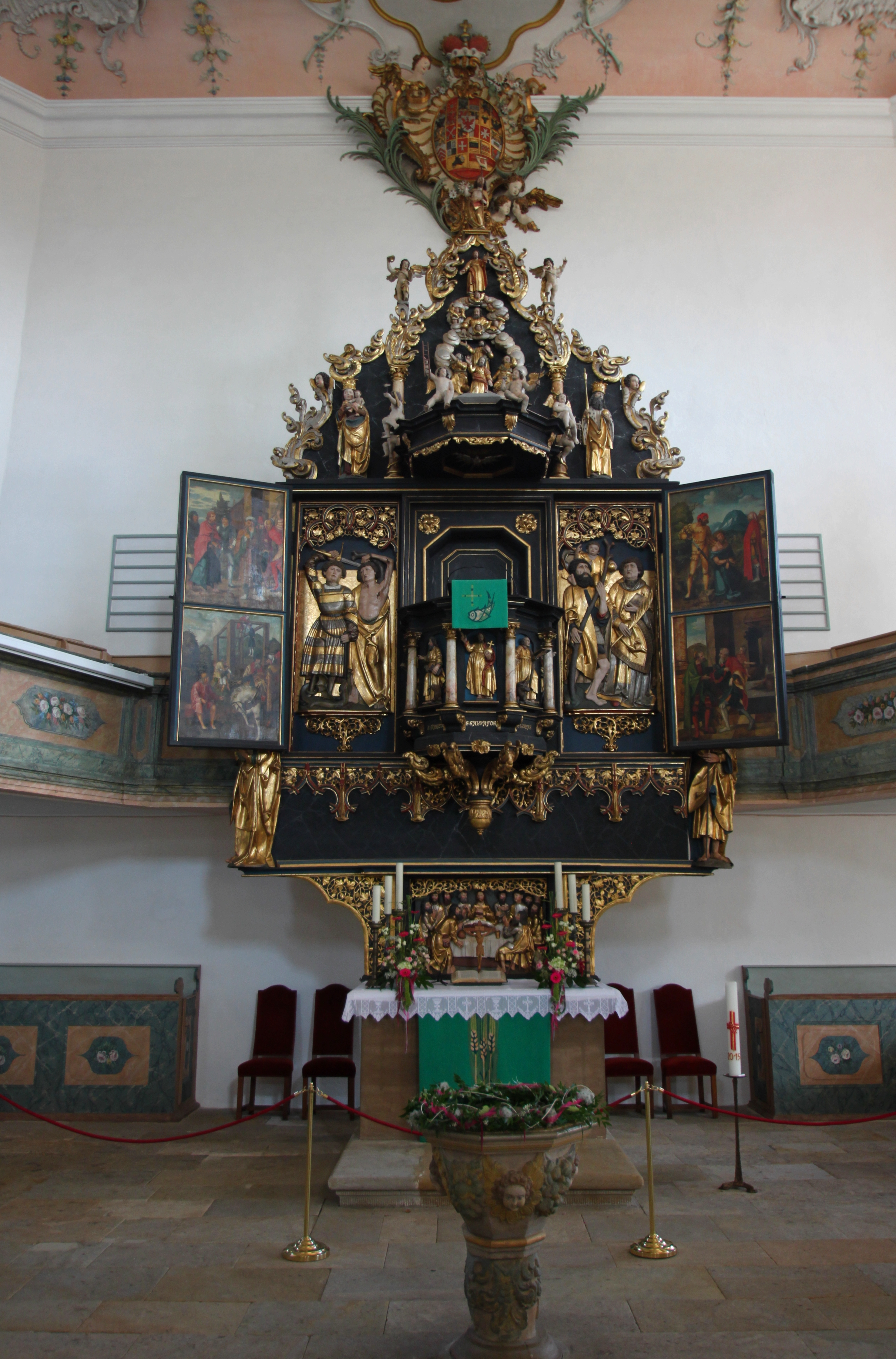 Evangelisch-lutherische Dreifaltigkeitskirche NeudrossenfeldThis is a photograph of an architectural monument.